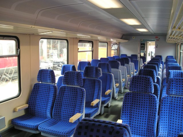 Bildbeschreibung: Neue Inneneinrichtung im aktuellen DB-Design im 628.4 Quelle: selbst fotografiert Fotograf/Zeichner: Christian Schulz Datum: 04.08.2005